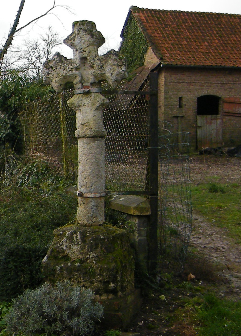 La vieille croix, évidée pour accueillir une autre croix, présumée dater de la bataille de Crécy (1346).